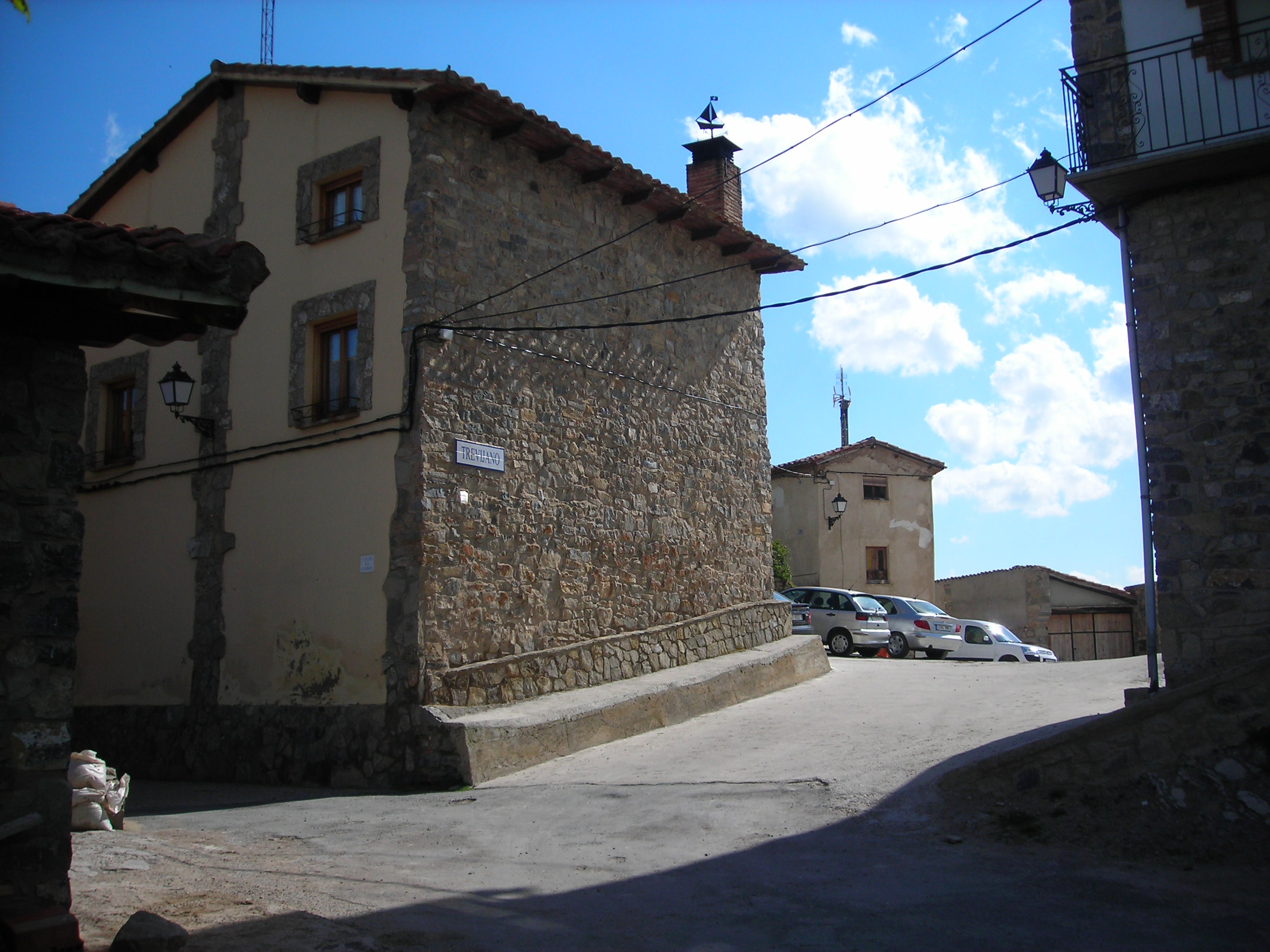 La Carrasca, entrada a Trevijano